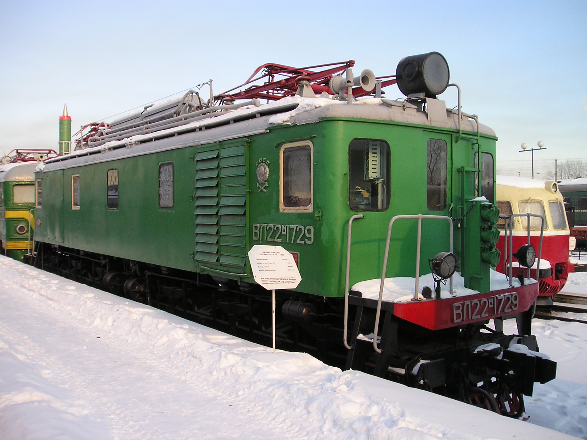 Soviet electric locomotive VL22